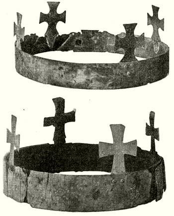 III. Béla magyar király és felesége halotti koronája